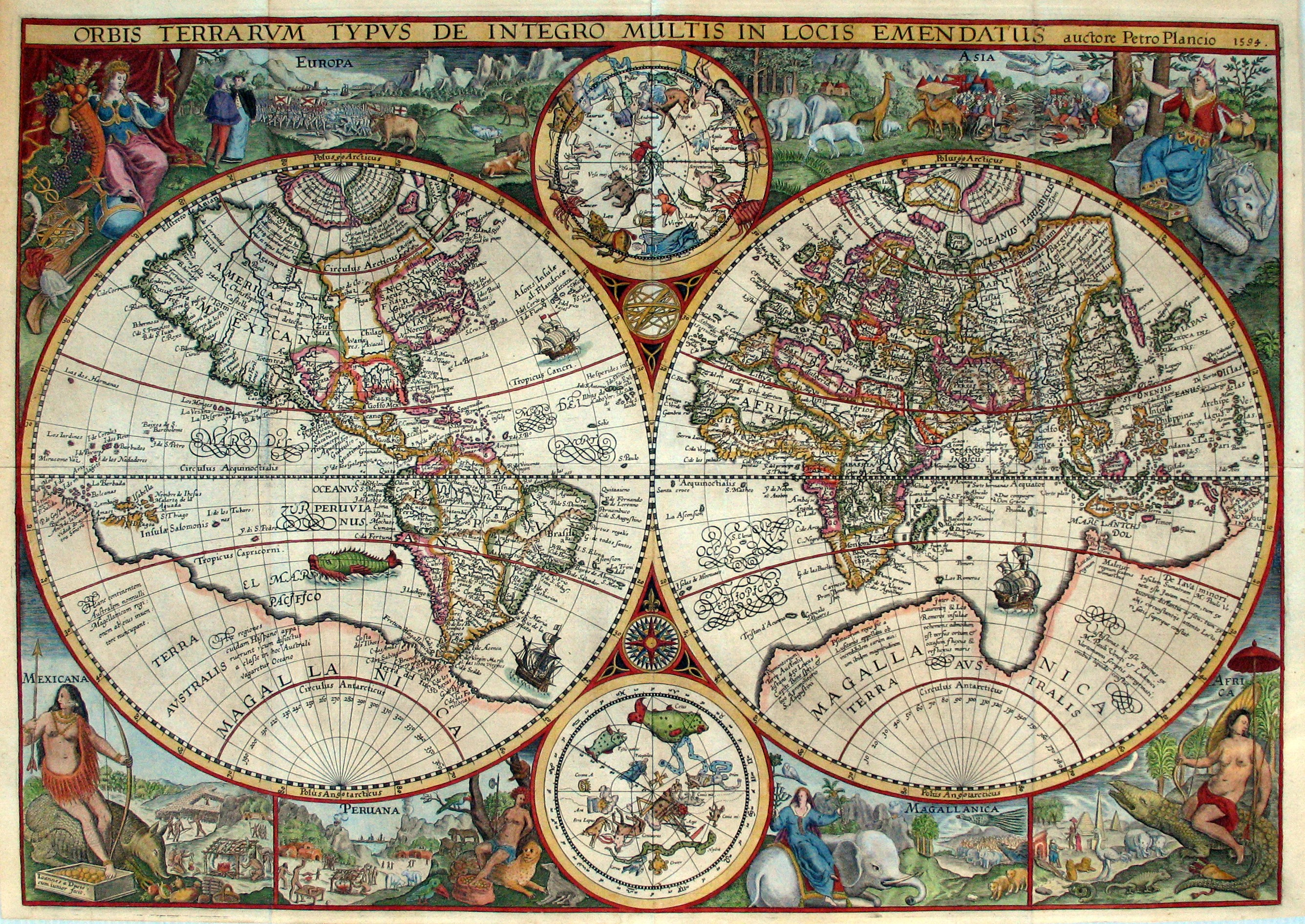 Orbis terrarum typus de integro multis in locis emendatus; size=405 x 575 mm